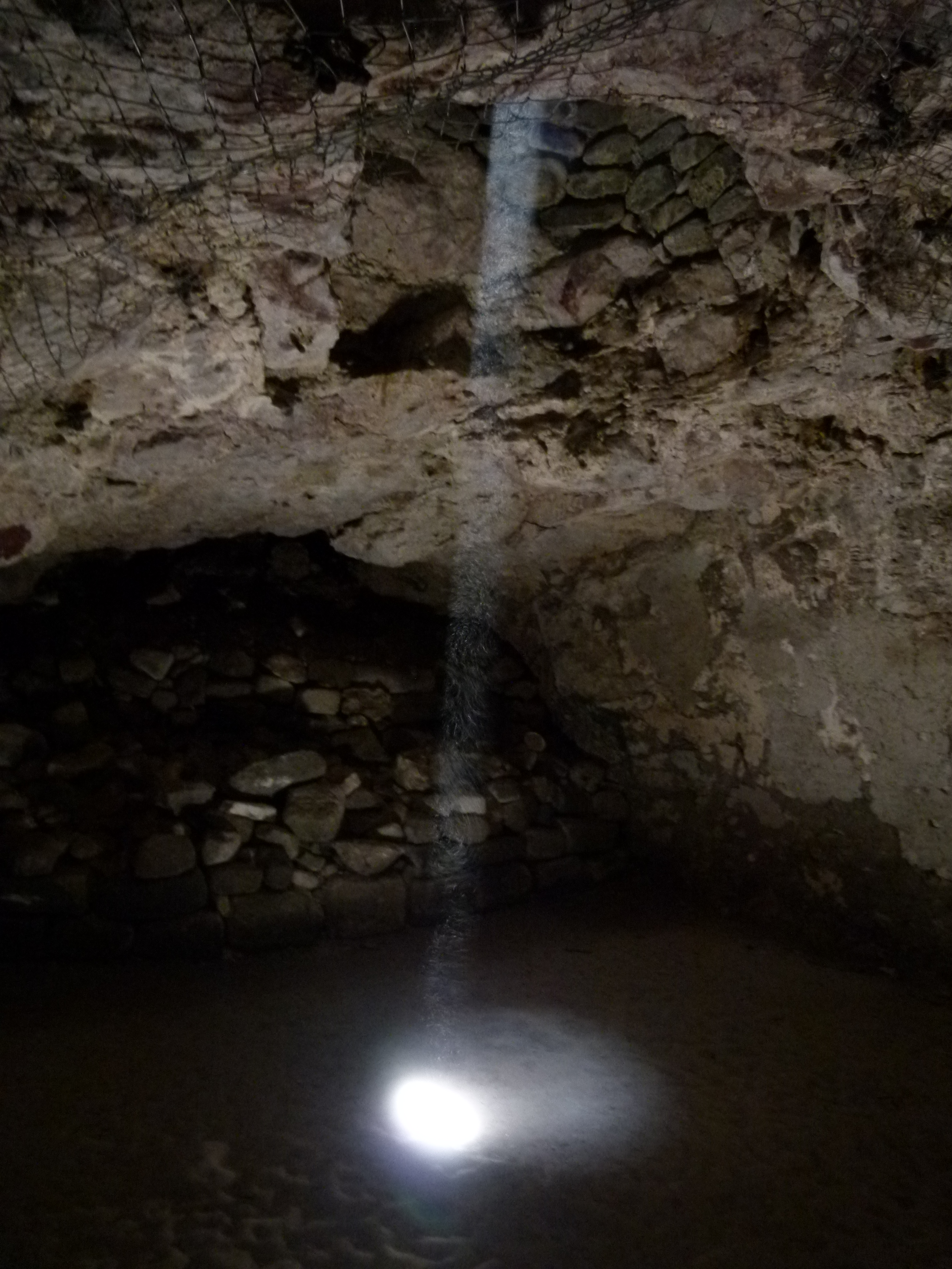 Aufgenommen am 20. Juli 2013 um 13:27 Uhr. Die Sonne steht an diesem Tag zwar nicht genau im Zenit, aber steil genug um direkt in den Schacht zu fallen. Der Strahl wurde durch aufgeworfenen Sand sichtbar gemacht.